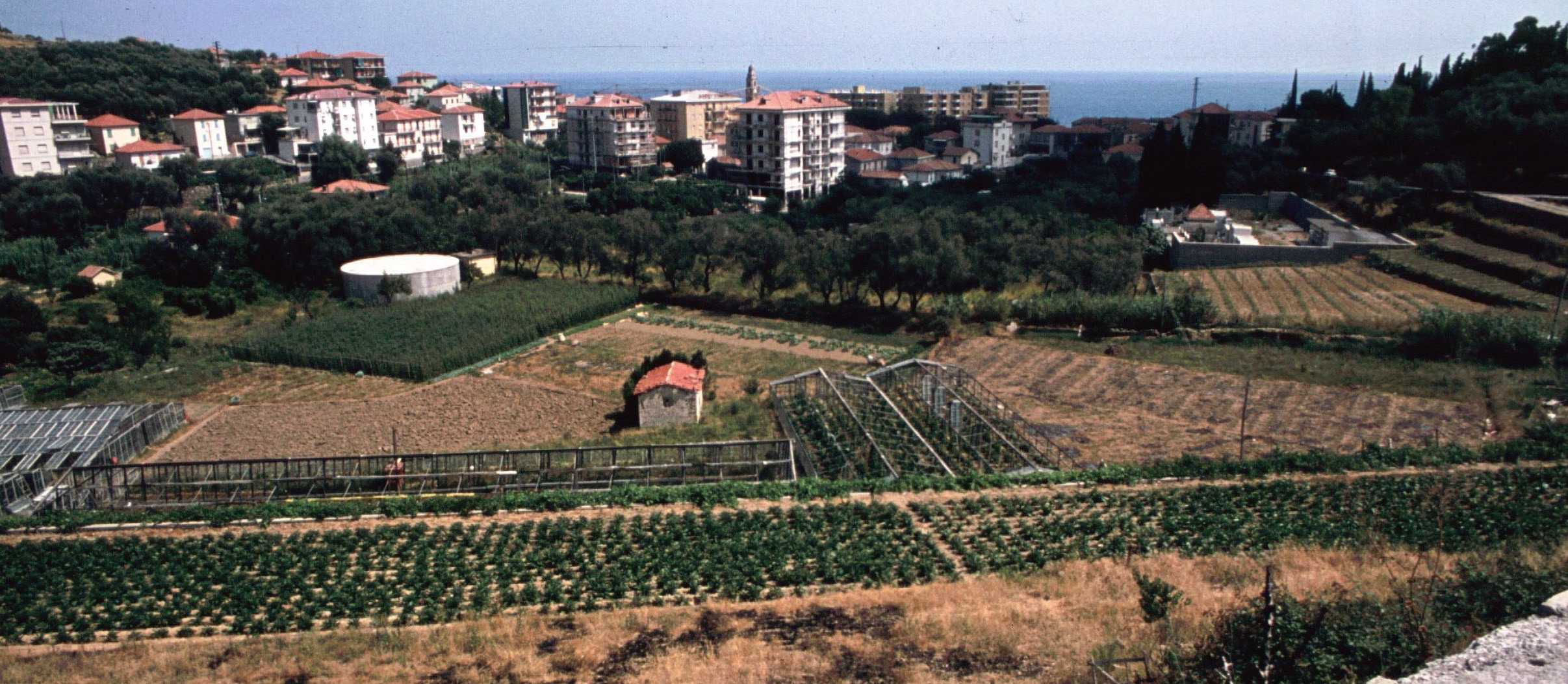 Celso Mosca, S.Lorenzo al mare, panorama